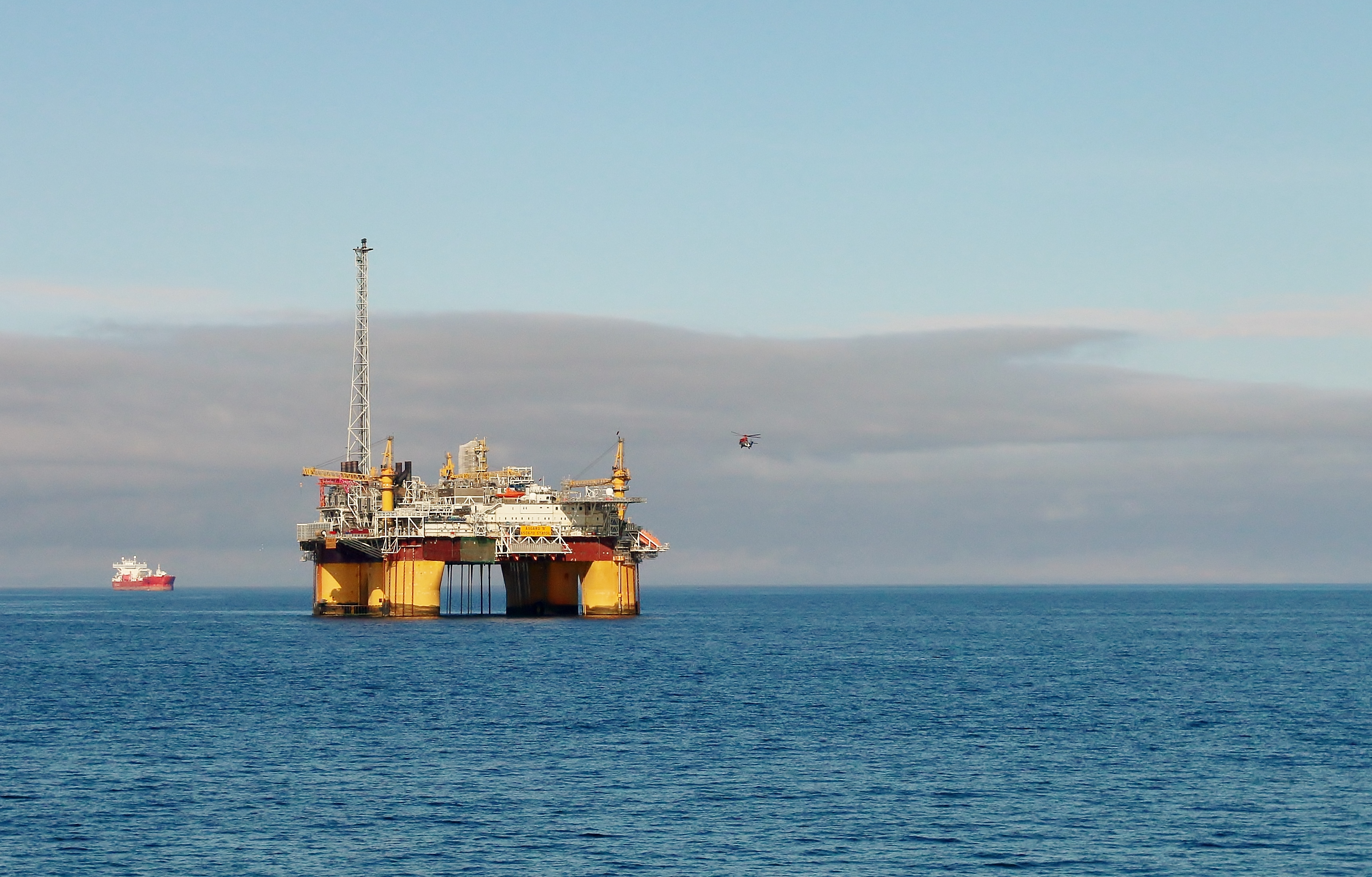 Åsgard består av forekomstene Midgard, Smørbukk og Smørbukk sør. I tillegg er gassfeltene Mikkel og Yttergryta knyttet opp mot infrastrukturen på Åsgard. Samlet sett er Åsgard blant de største utbyggingene på norsk sokkel. Foto: Øyvind Knoph Askeland, Norsk olje og gass